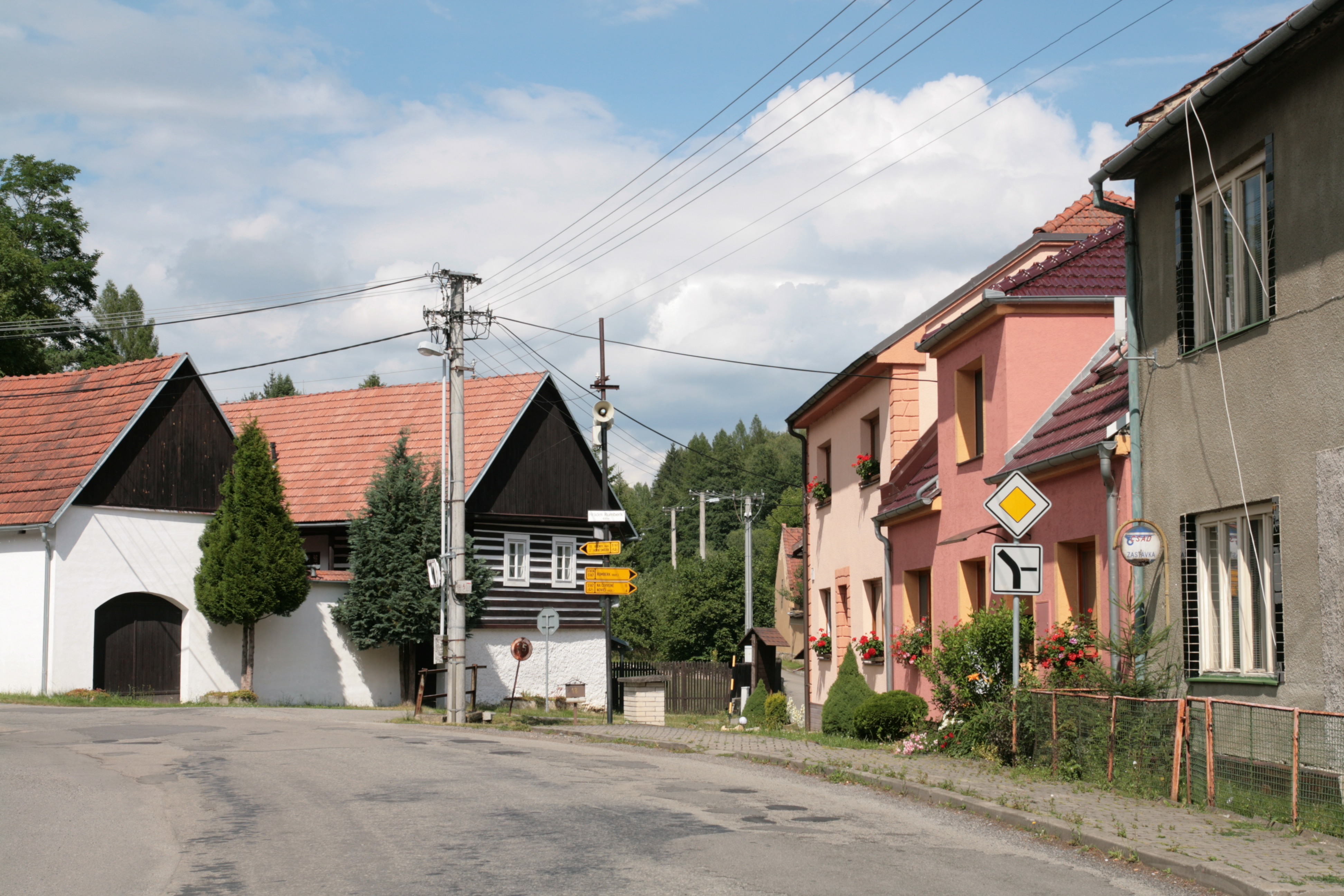 Vesnice Rumberk, část obce Deštná v okrese Blansko. Centrální křižovatka. Vlevo dům čp. 21, zprava, domy čp. 16 (šedý), 17 a 18.